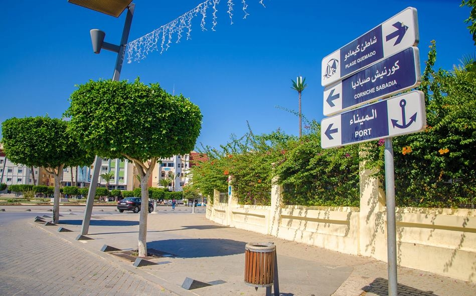 Plaza Alhucemas